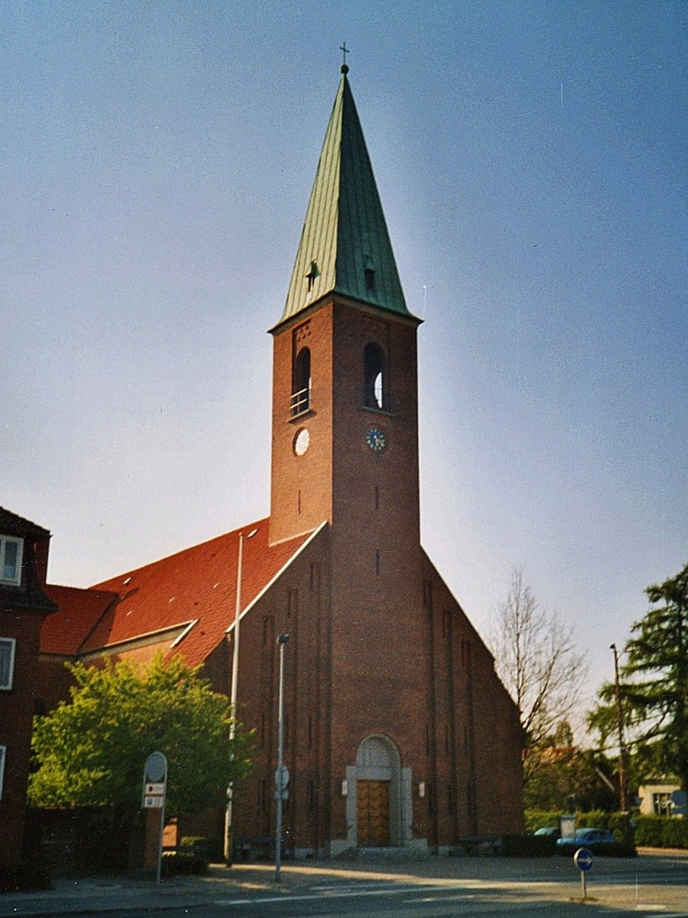 Helleruplund, Helleruplund Sogn, Gentofte Kommune